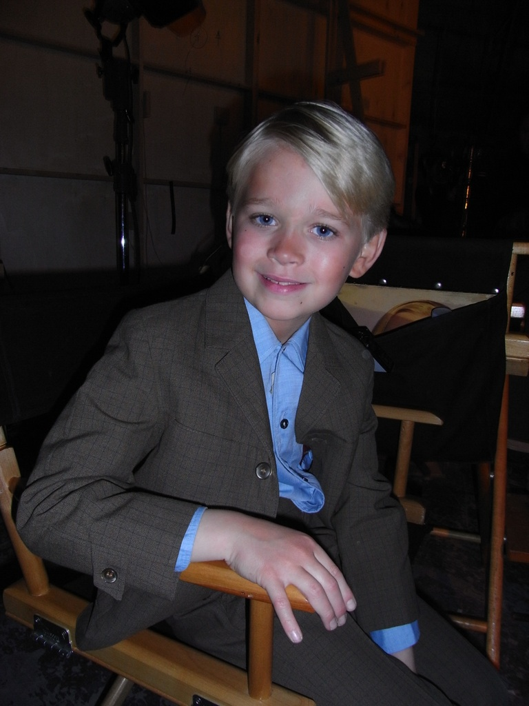 Tom Dufour pendant le tournage de "Cloclo"